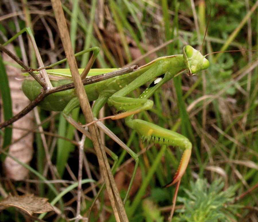 Mantis religiosa, Lobau, Vienna